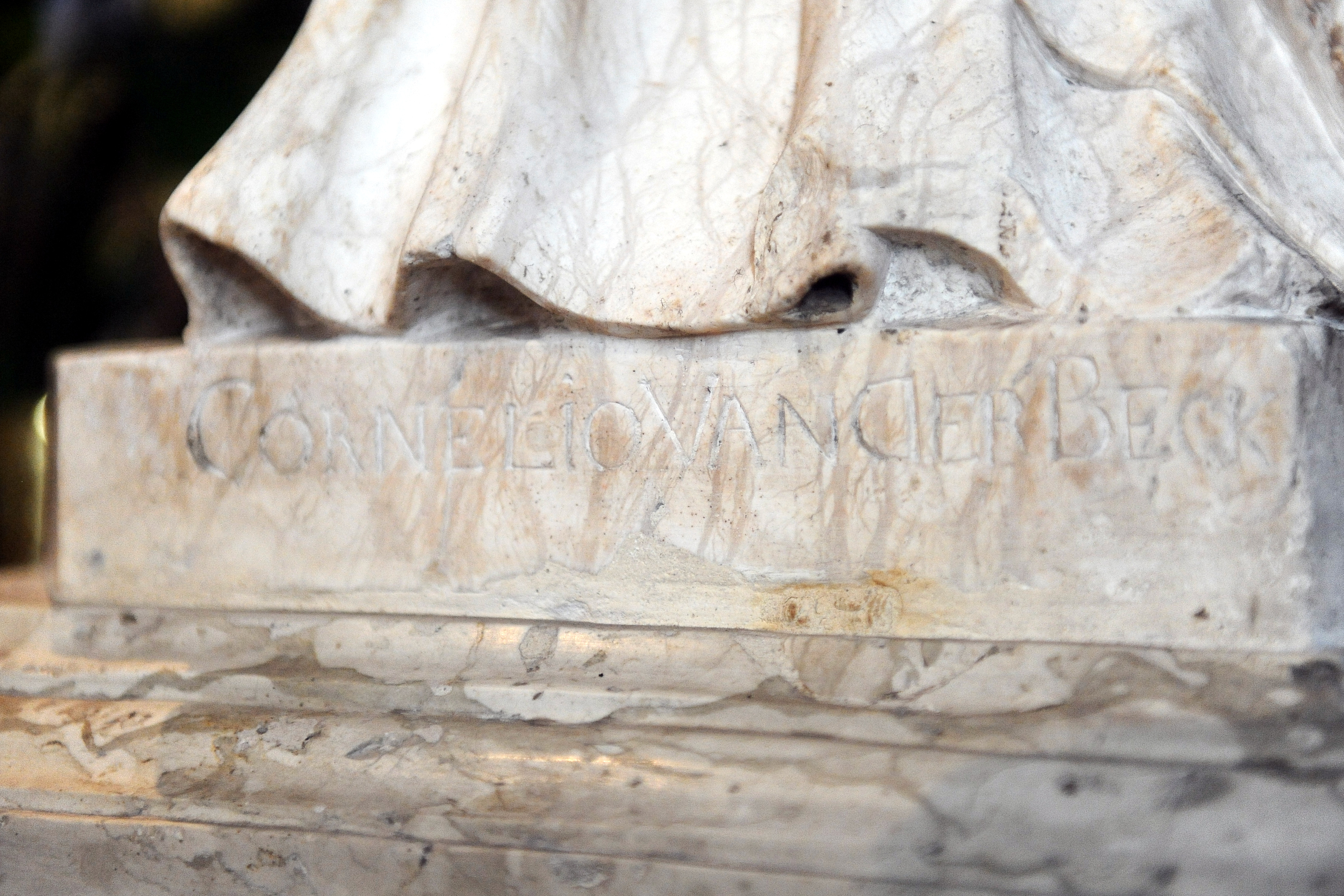 Altare della Chiesa di Santa Maria Maggiore (Trento). Firma di Cornelis van der Beck su una delle statue.